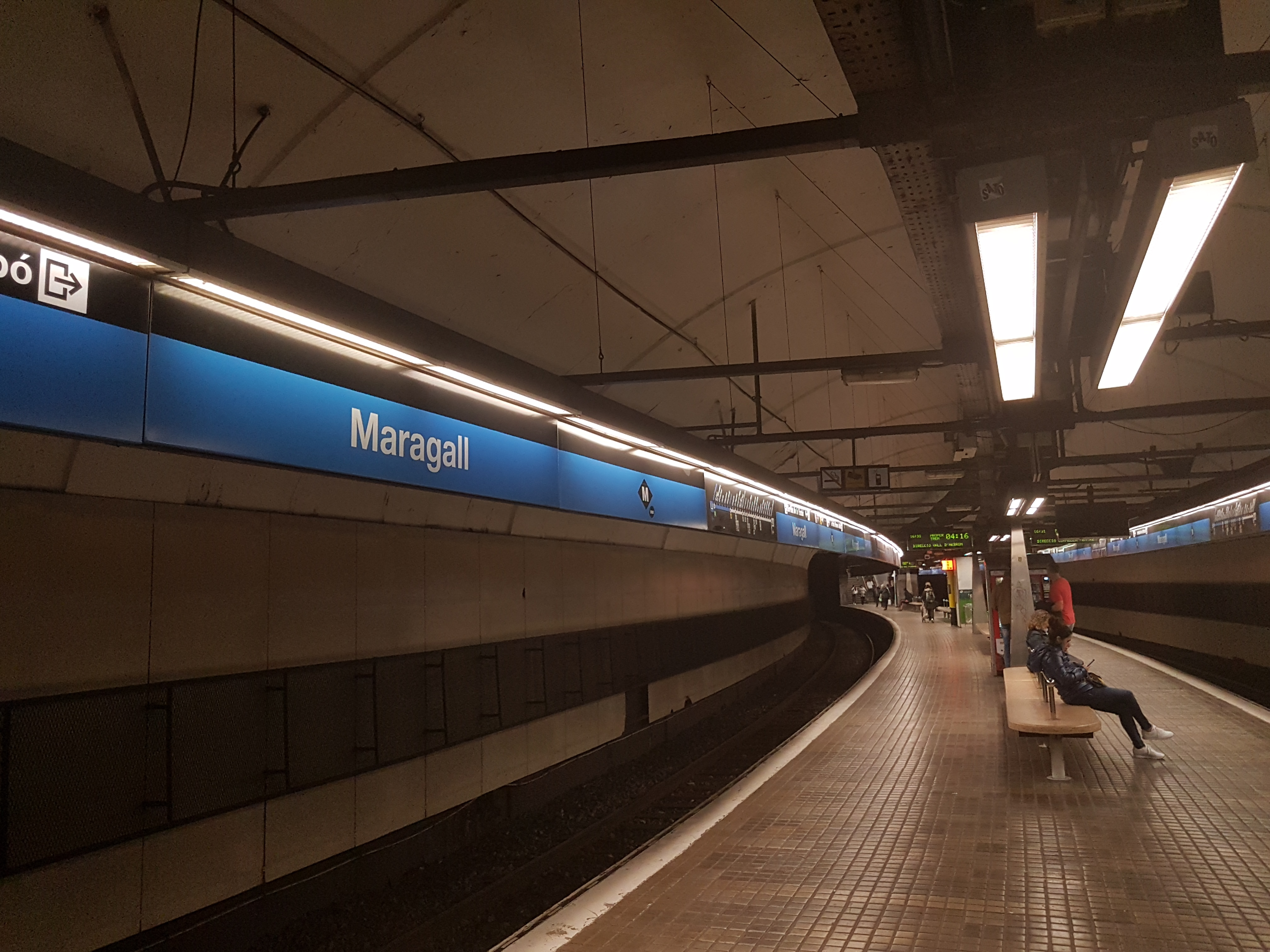 Estació de Maragall de la L5 del metro de Barcelona